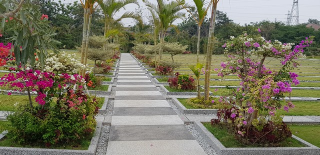 Pemakaman Muslim Al-Azhar Memorial Garden Karawang dengan konsep "makam dalam taman" yaitu dengan landscape yang hijau dan asri